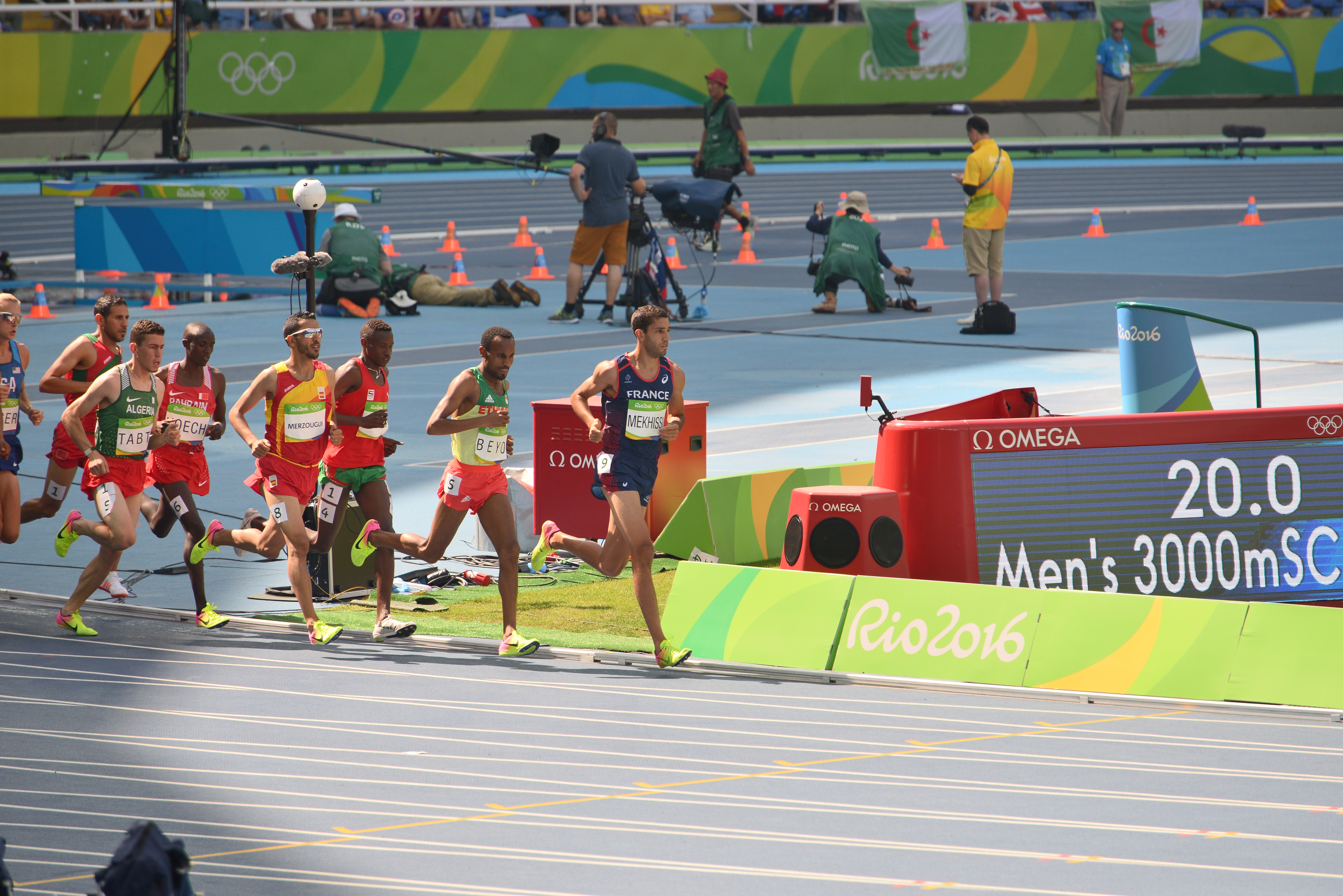 Série du 3000m steeple Homme des JO de Rio, 2016